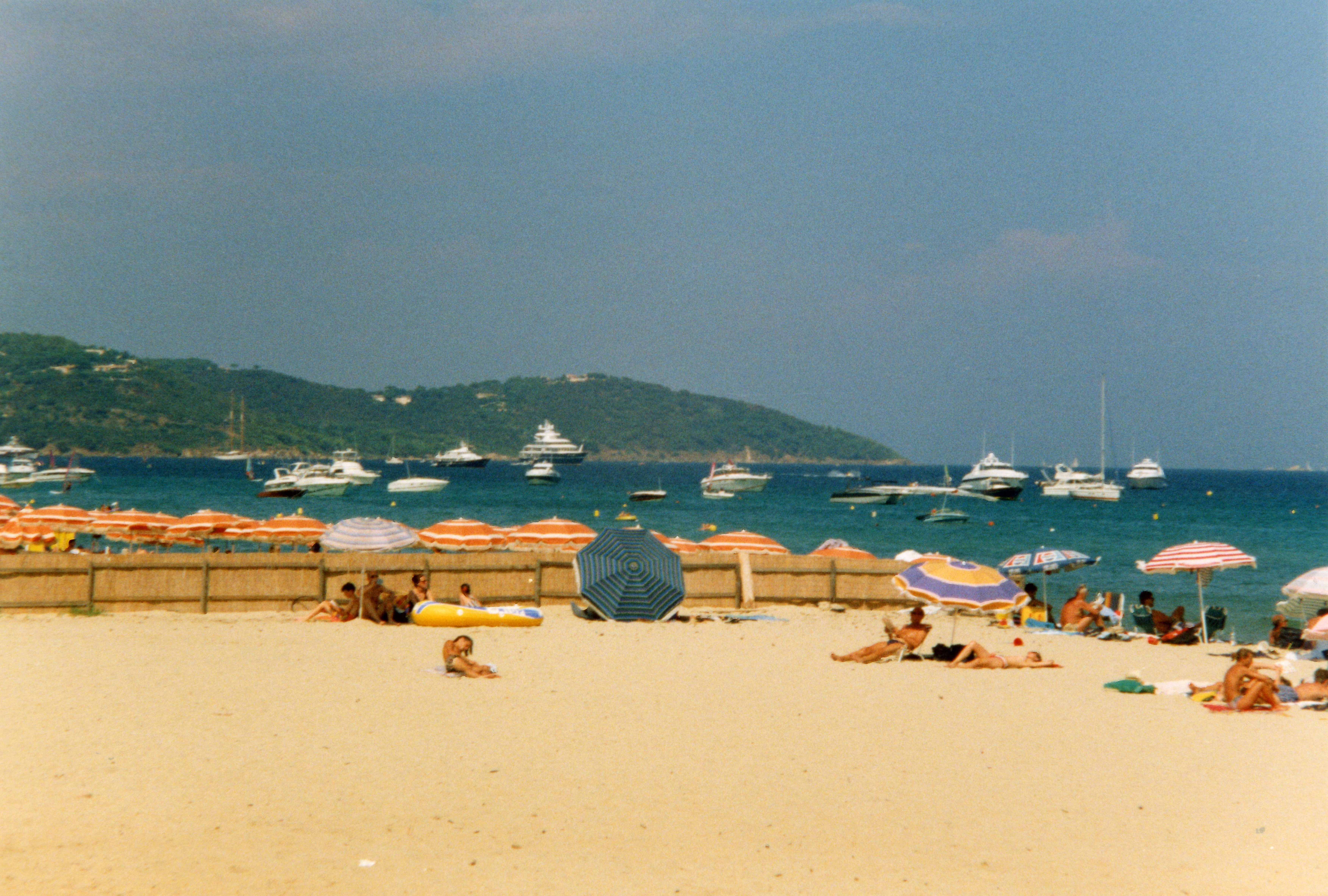 Des bateaux de plaisance de plusieurs types mouillés dans la baie de Pampelonne (face à la Plage de Pampelonne divisées en plages publiques et privées). De leur bateau, certains plaisanciers vont sur les plages privées. À l'arrière plan, on distingue le Cap de Pinet. La baie de Pampelonne est située dans la presqu' île de Saint-Tropez. Plage de Pampelonne, Var, France.